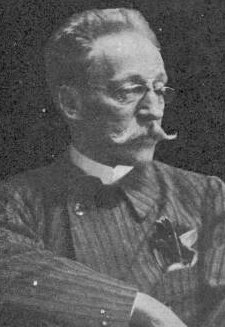 Hungarian painter Béla Spányi (1852-1914)